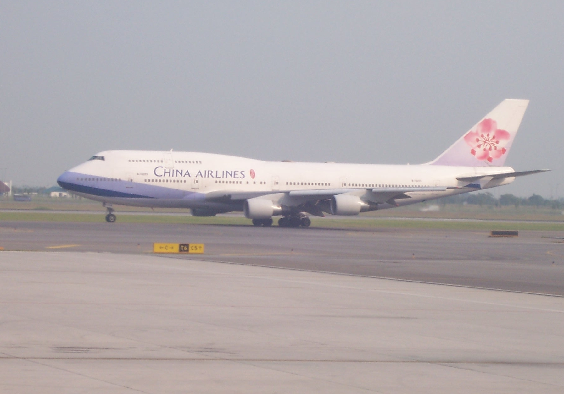 China Airlines, Boeing 747, Bangkok Airport